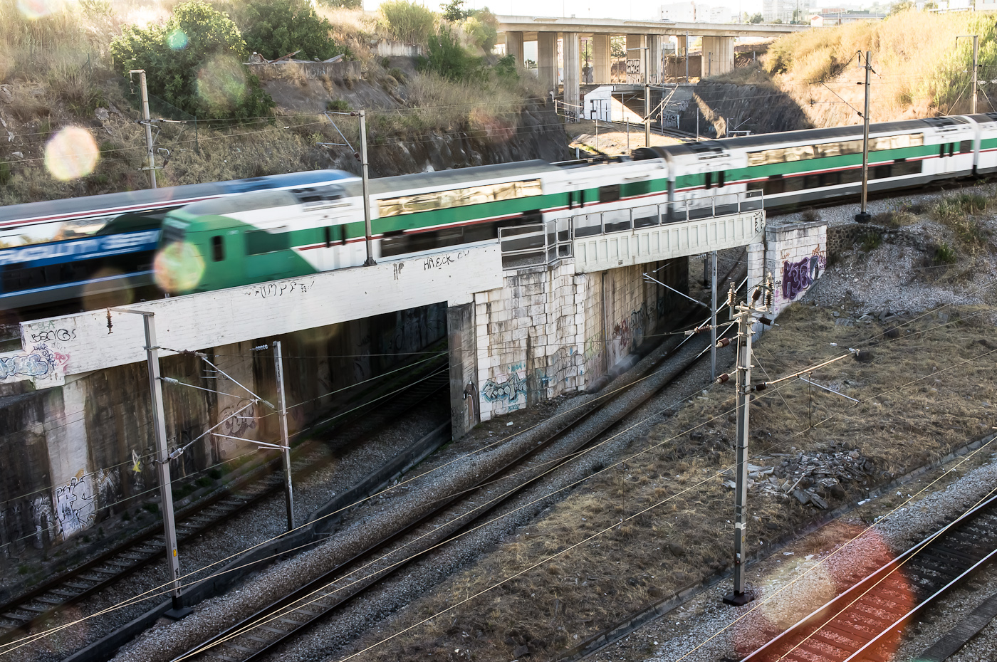 Lisboa - Detalles - 5